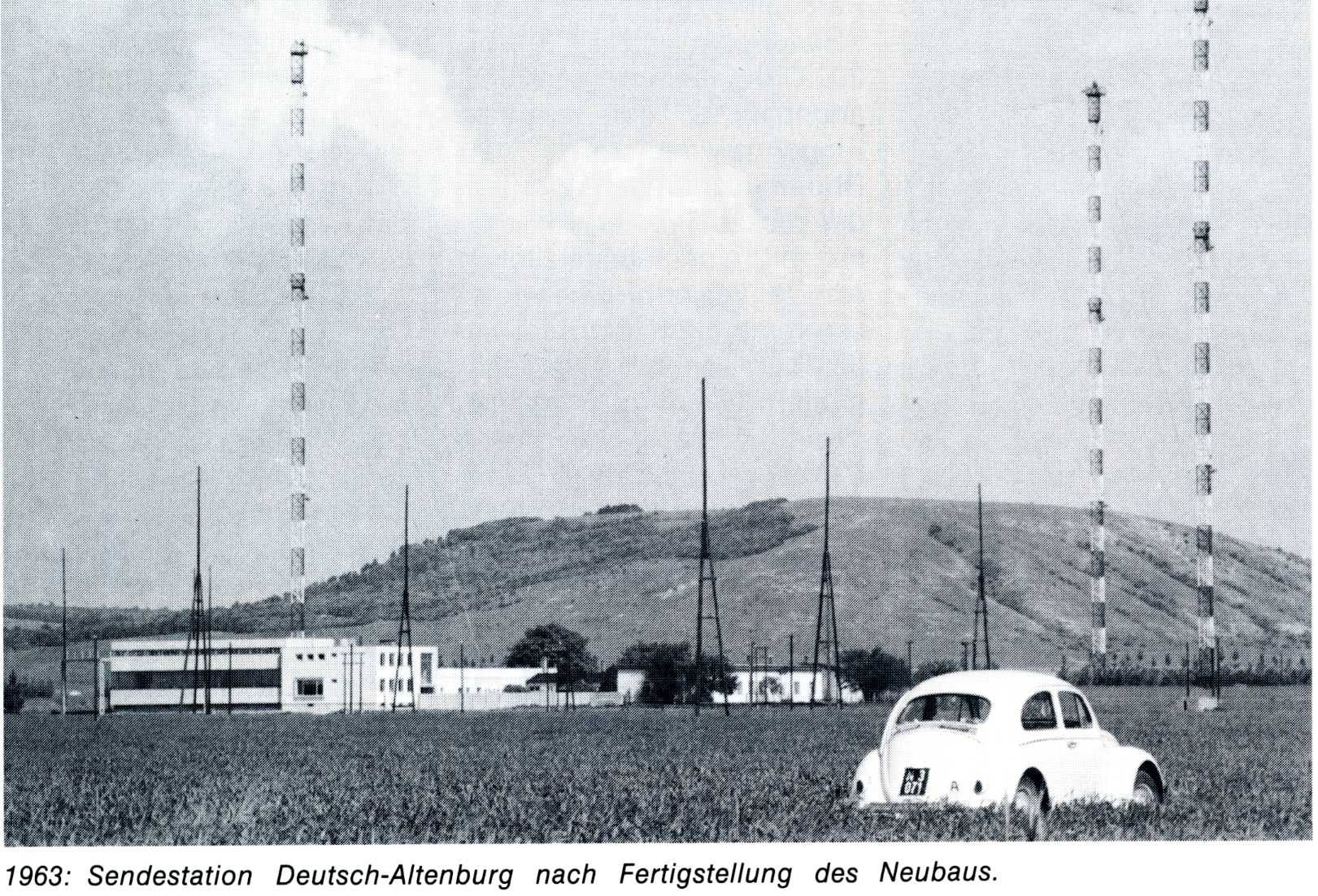 Die Sendestation im Jahre 1963